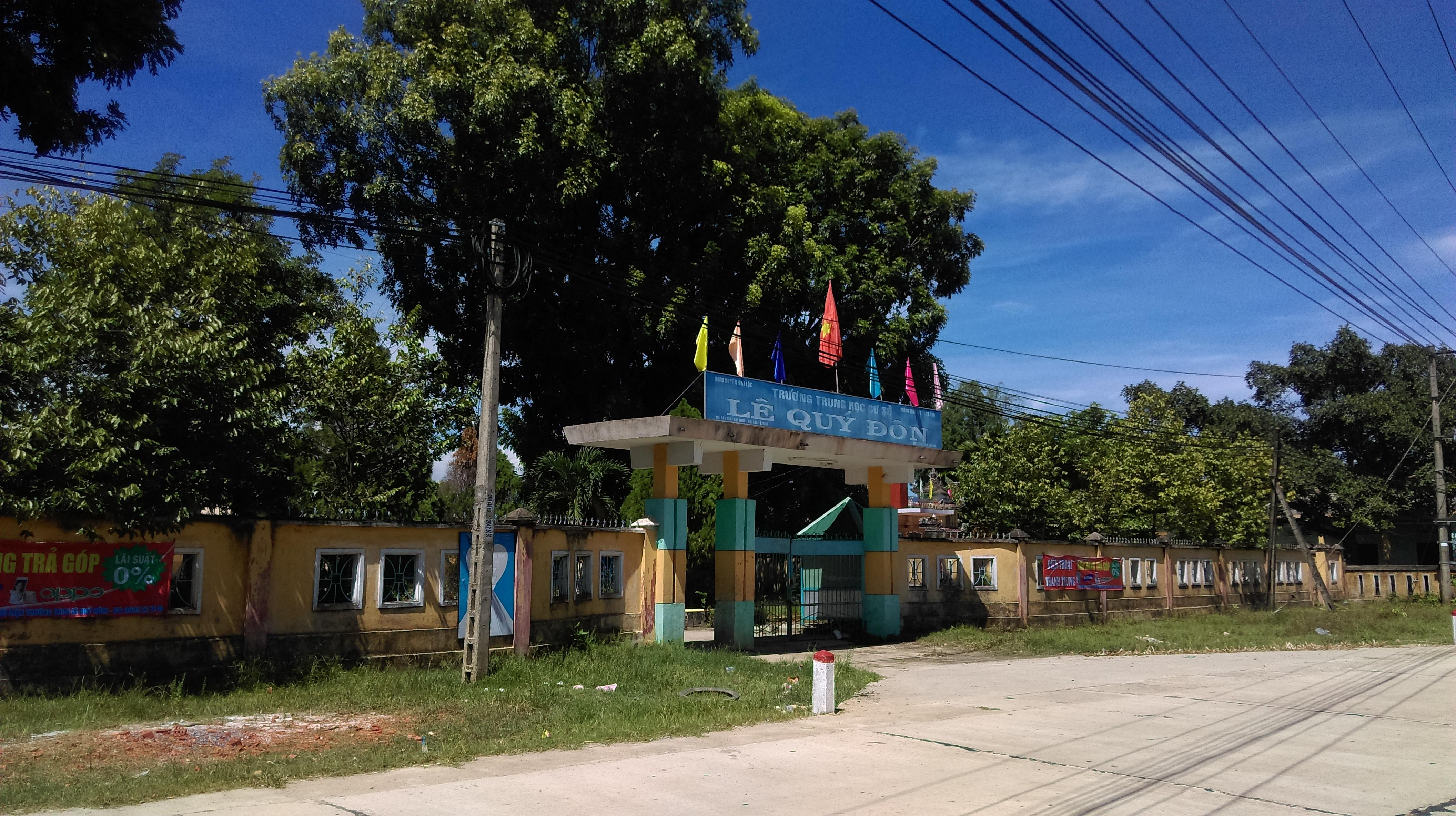 Trường THCS Lê Quý Đôn, Đại Minh, Đại Lộc, Quảng Nam